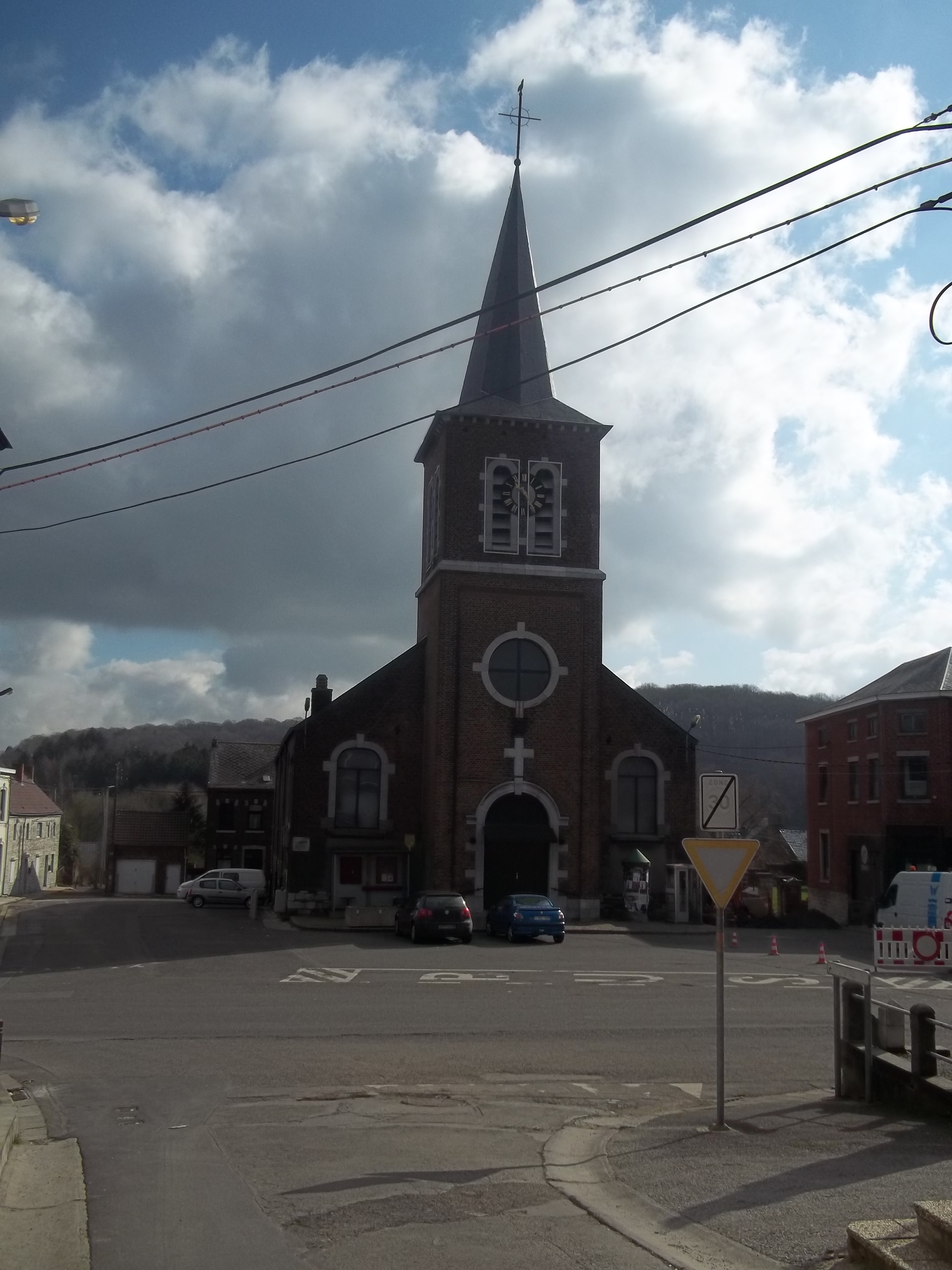 Eglise Saint Rémy à Falisolle